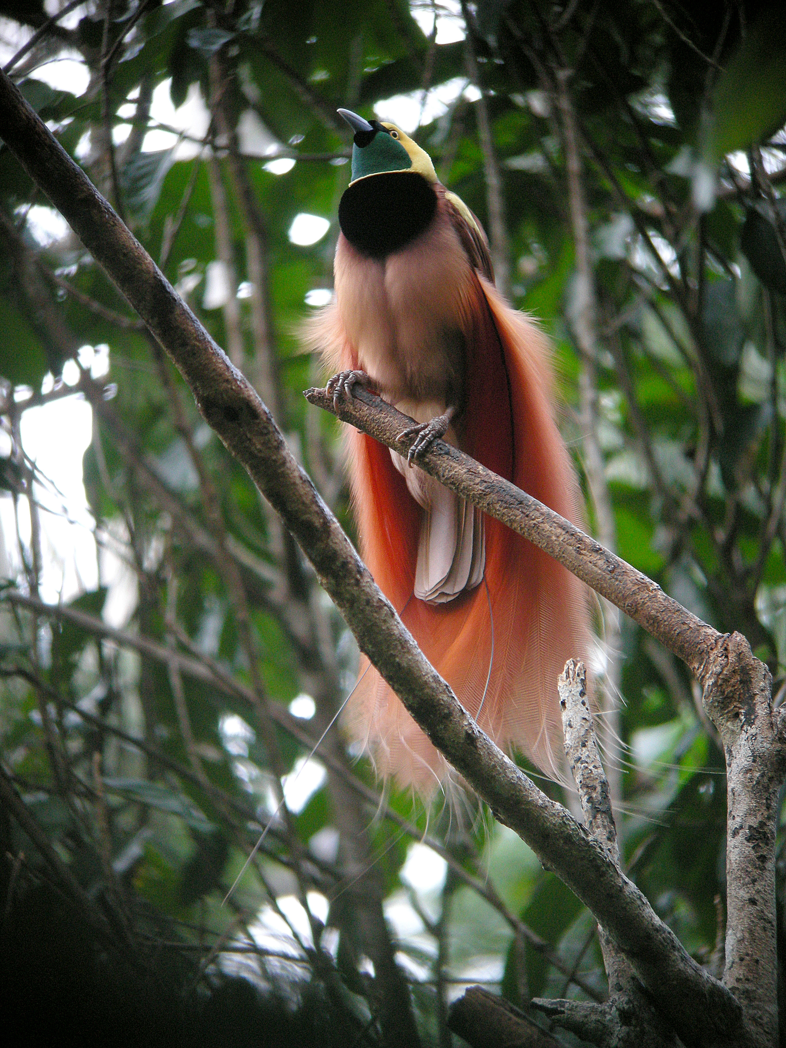 Raggiana Bird of Paradise, Paradisaea raggiana